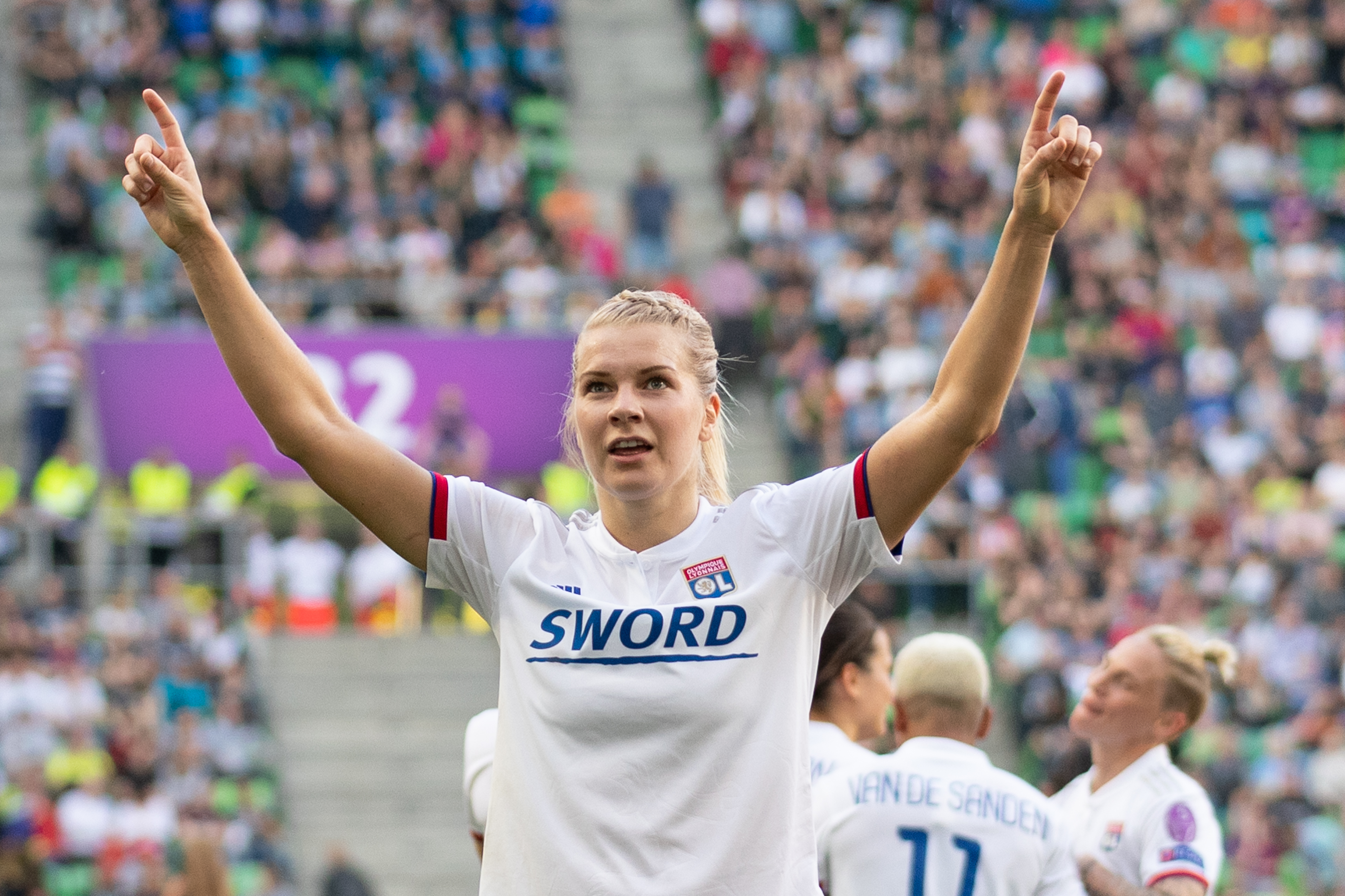 Fußball, Frauen, UEFA Women's Champions League, Olympique Lyonnais - FC Barcelona; Ada Hegerberg (Olympique Lyon,14) feiert ihr drittes Tor zum 0:4; Jubel, celebration; Tor, goal, Torerfolg, Aktion